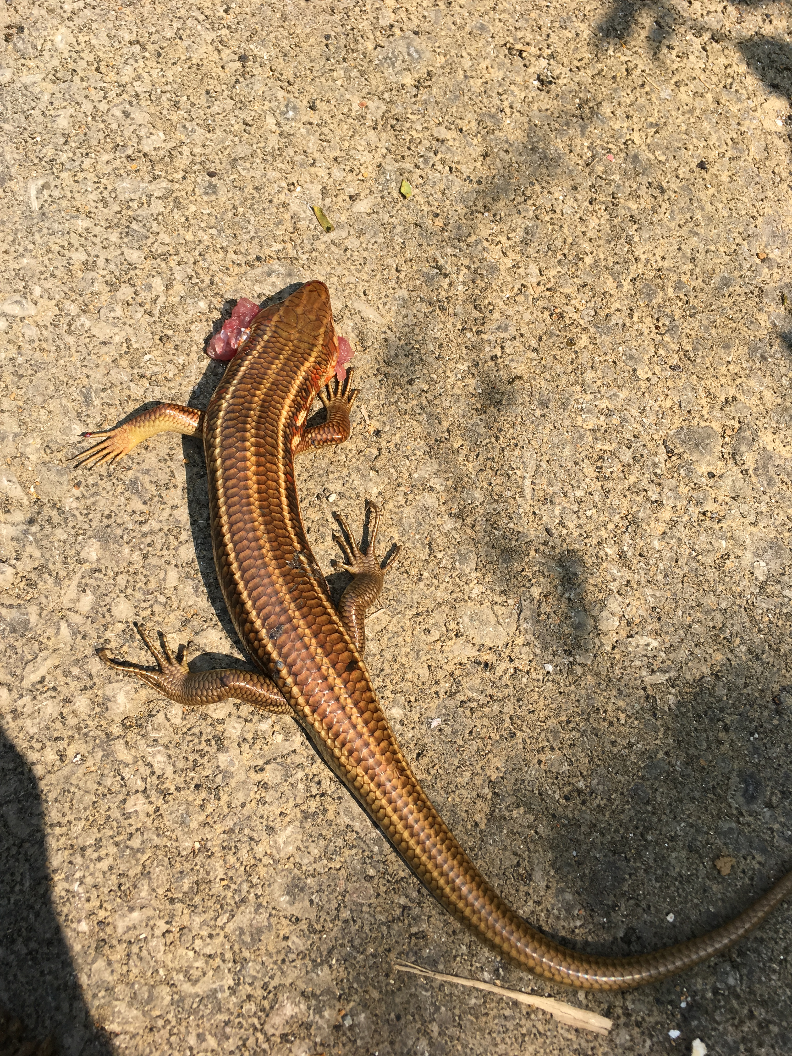 石垣島にて、頭部を轢かれたと思われる個体